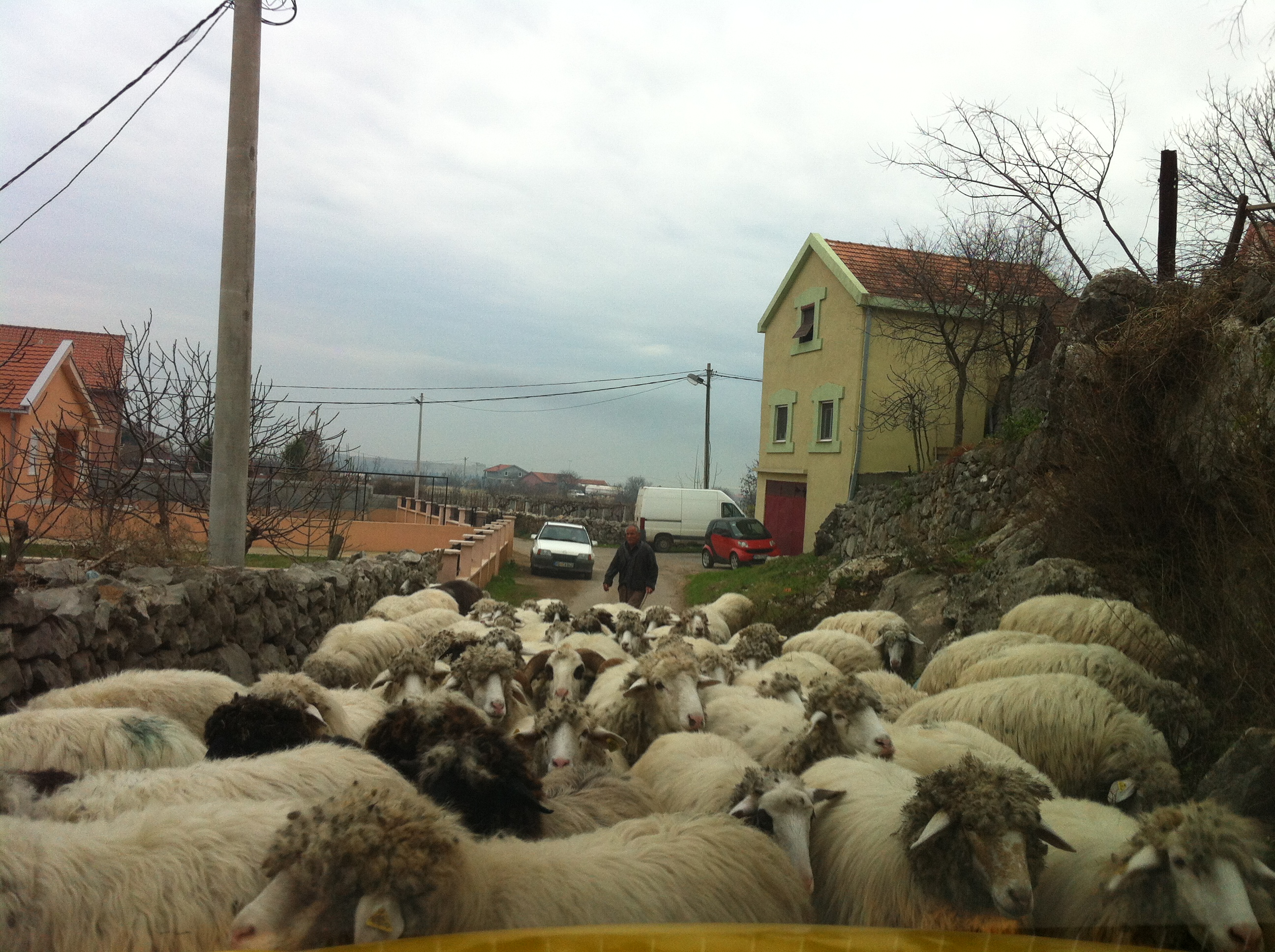 Omerbožovići, Montenegro